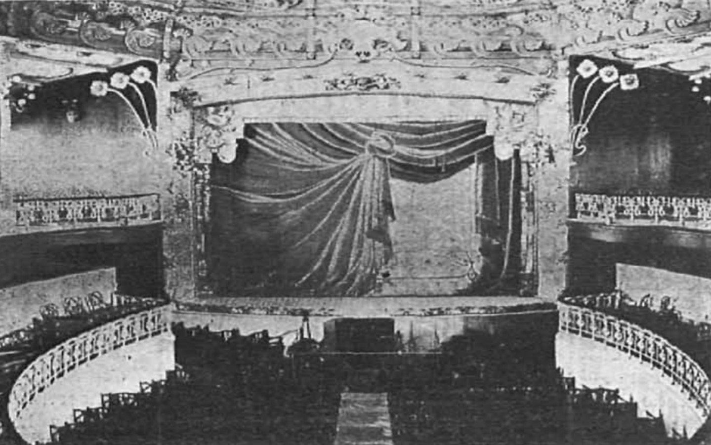 Interior del desaparecido Teatro Escuela (también llamado Teatro de la Ciudad), un teatro-circo construido en la Ciudad Lineal de Madrid en 1906. Fue diseñado por Ricardo Marcos Bausá y Emilio Vargas.